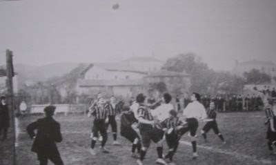 Olympique de Marseille - Stade helvètique de Marseille, décembre 1908.